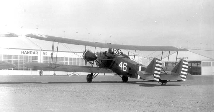 KeystoneLB7oak